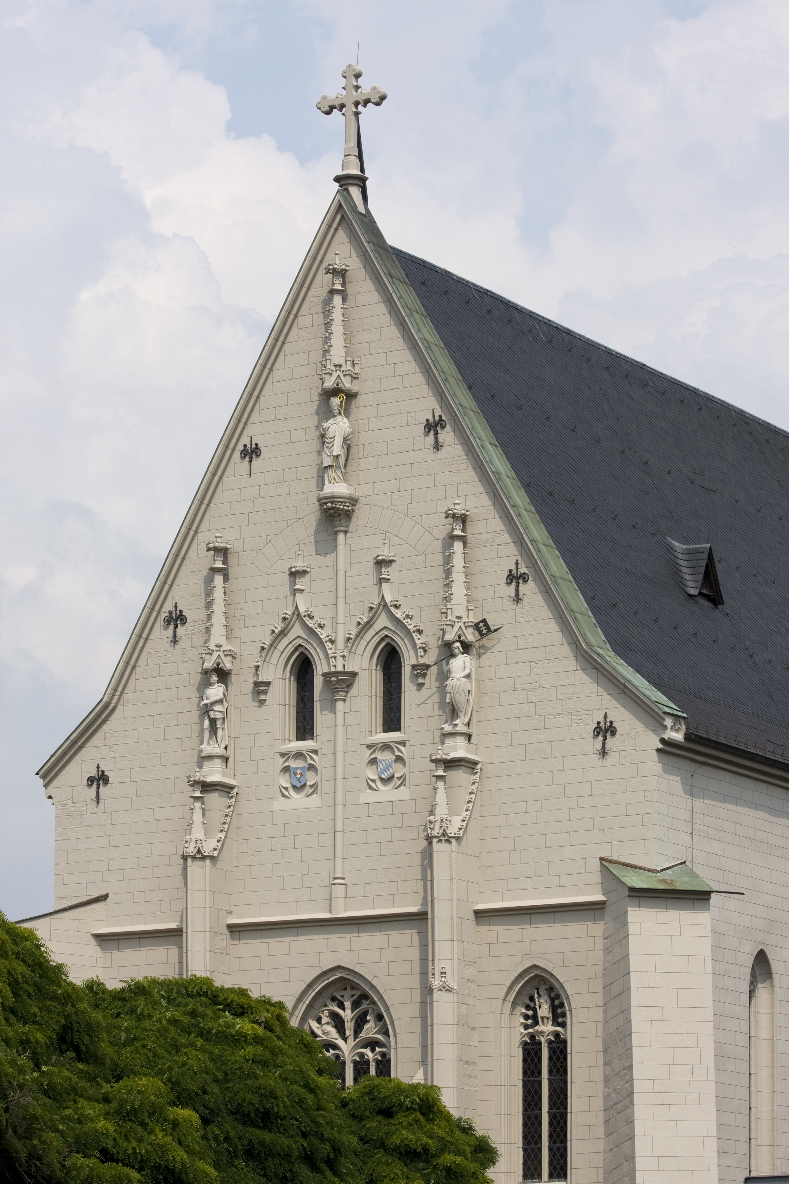 Westfassade der Ritterkapelle Haßfurt